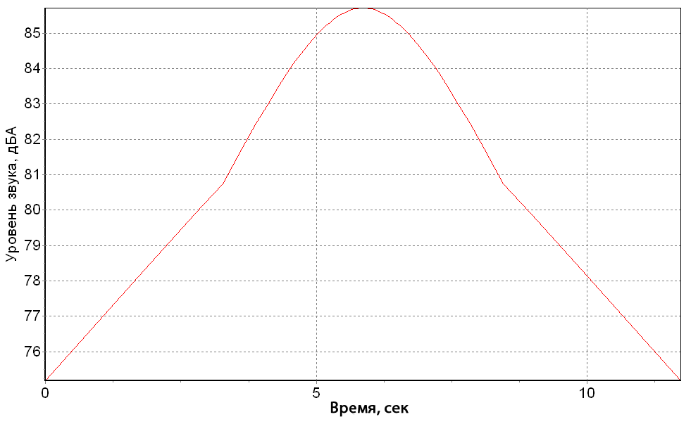 Фиг. 4. Промяна на нивото на звука на движещ се влак със скорост 120 км/ч и шумова характеристика 90 dB(A)